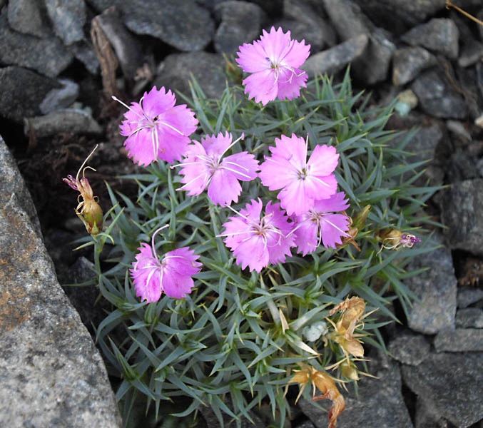 Dianthus webbianus var. alpinus